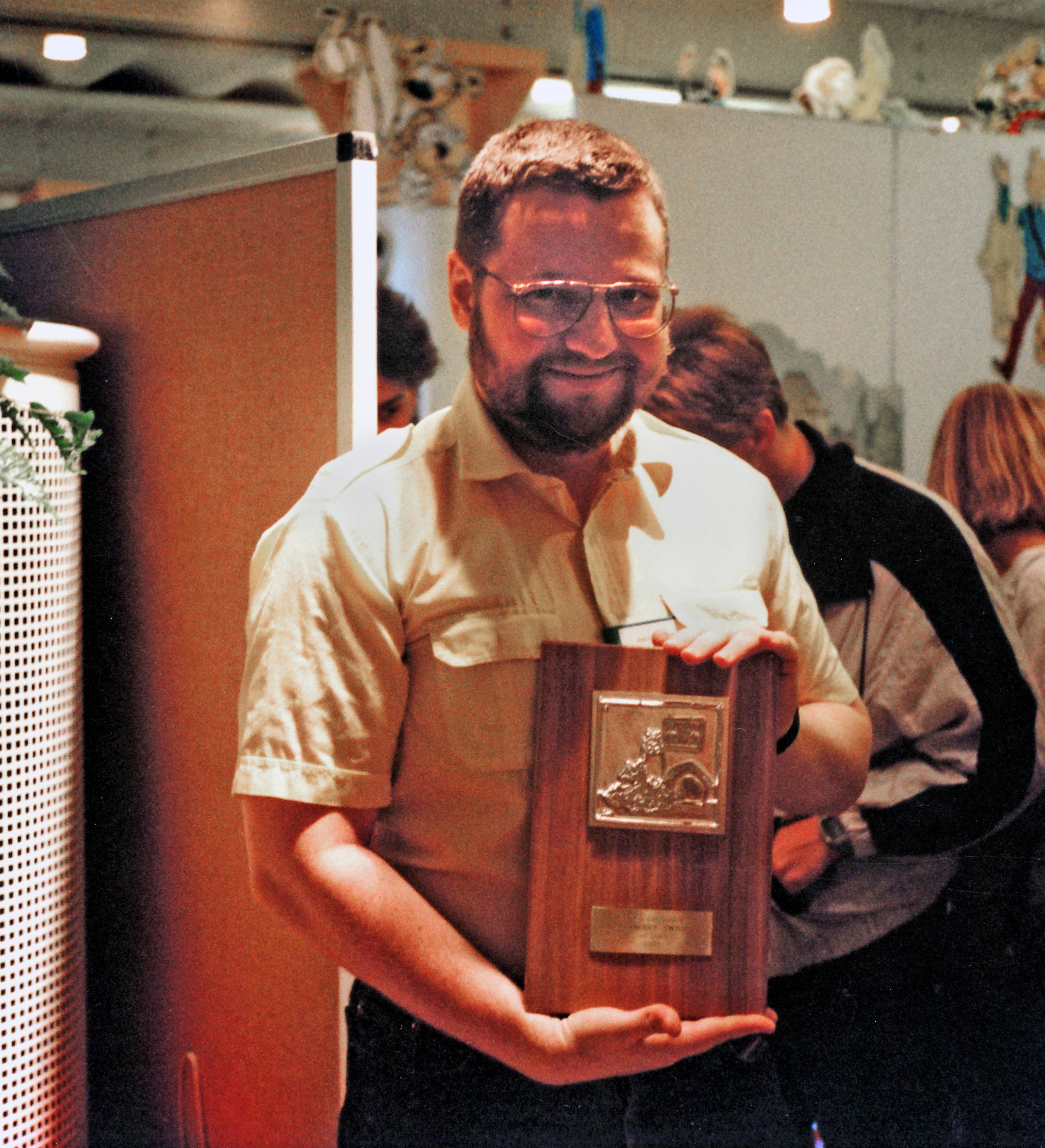 Daniel Atterbom håller en Urhunden-plakett, att delas ut under Kalmar seriefestival. Plakettbilden är en (spegelvänd) kopia av file:Varning för Urhunden.png från tidigt 1900-tal.